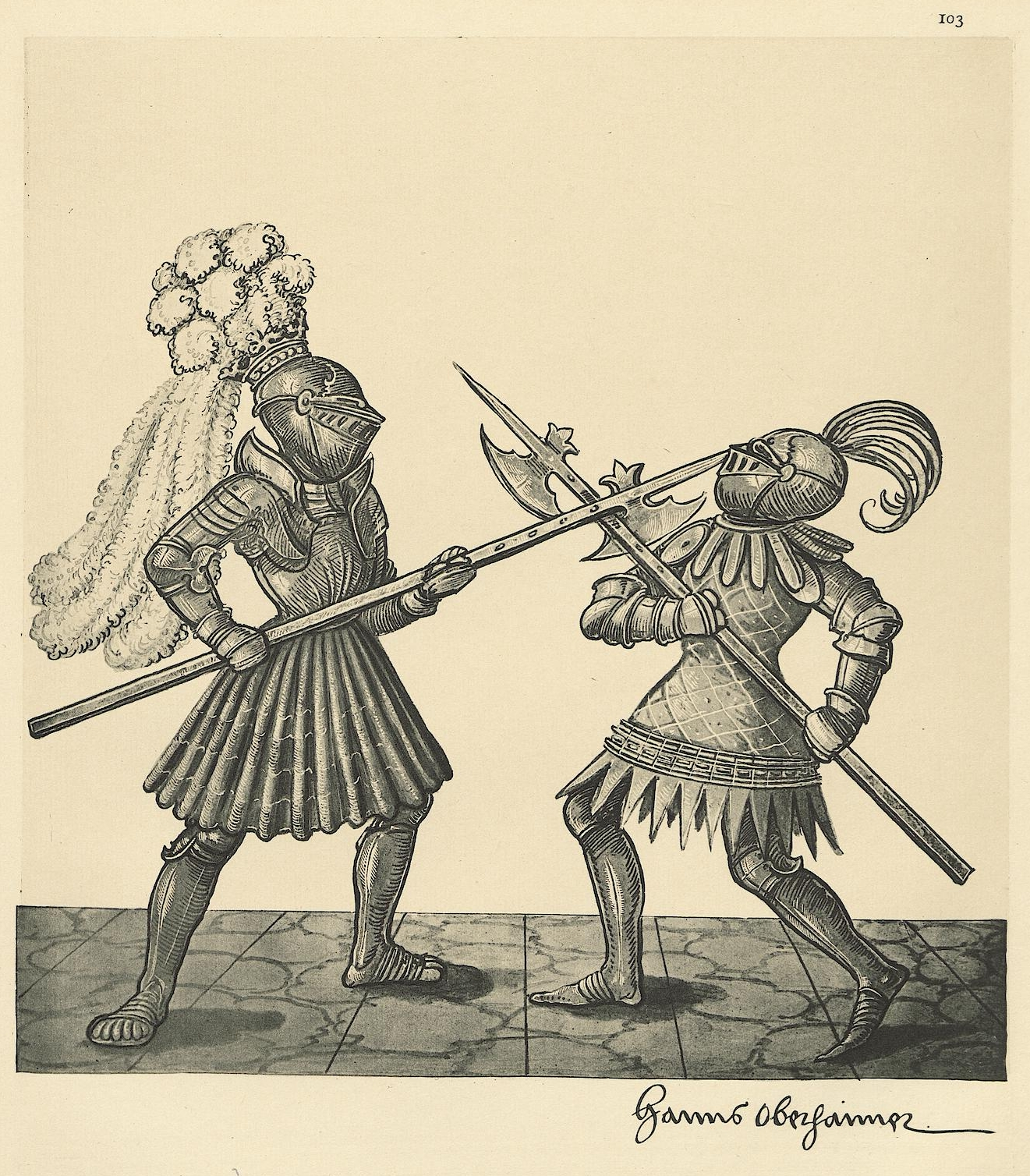 Tafel aus: Freydal: des Kaisers Maximilian I. Turniere und Mummereien; mit einer geschichtl. Einleitung. Tafeln. Wien, 1882. Exemplar der UB Tübingen. (Faksimileedition des Turnierbuchs Freydal, Kunsthistorisches Museum Wien, Signatur: K.K. 5073) Tafel 103 Hanns Oberhaimer